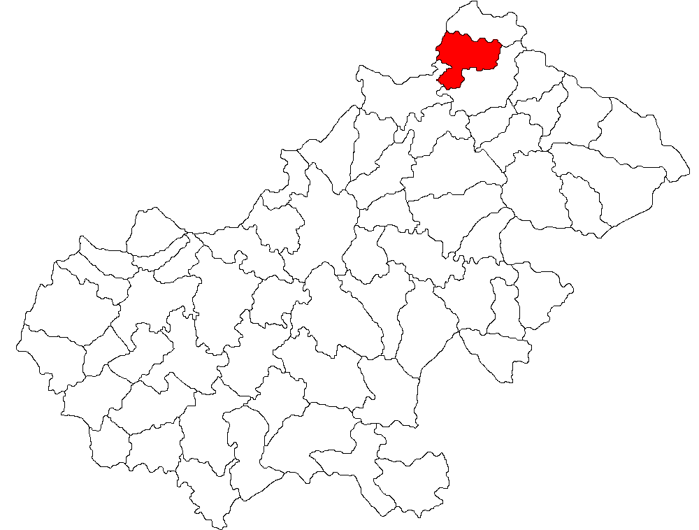 Categorie:Hărţi ale judeţului Satu Mare